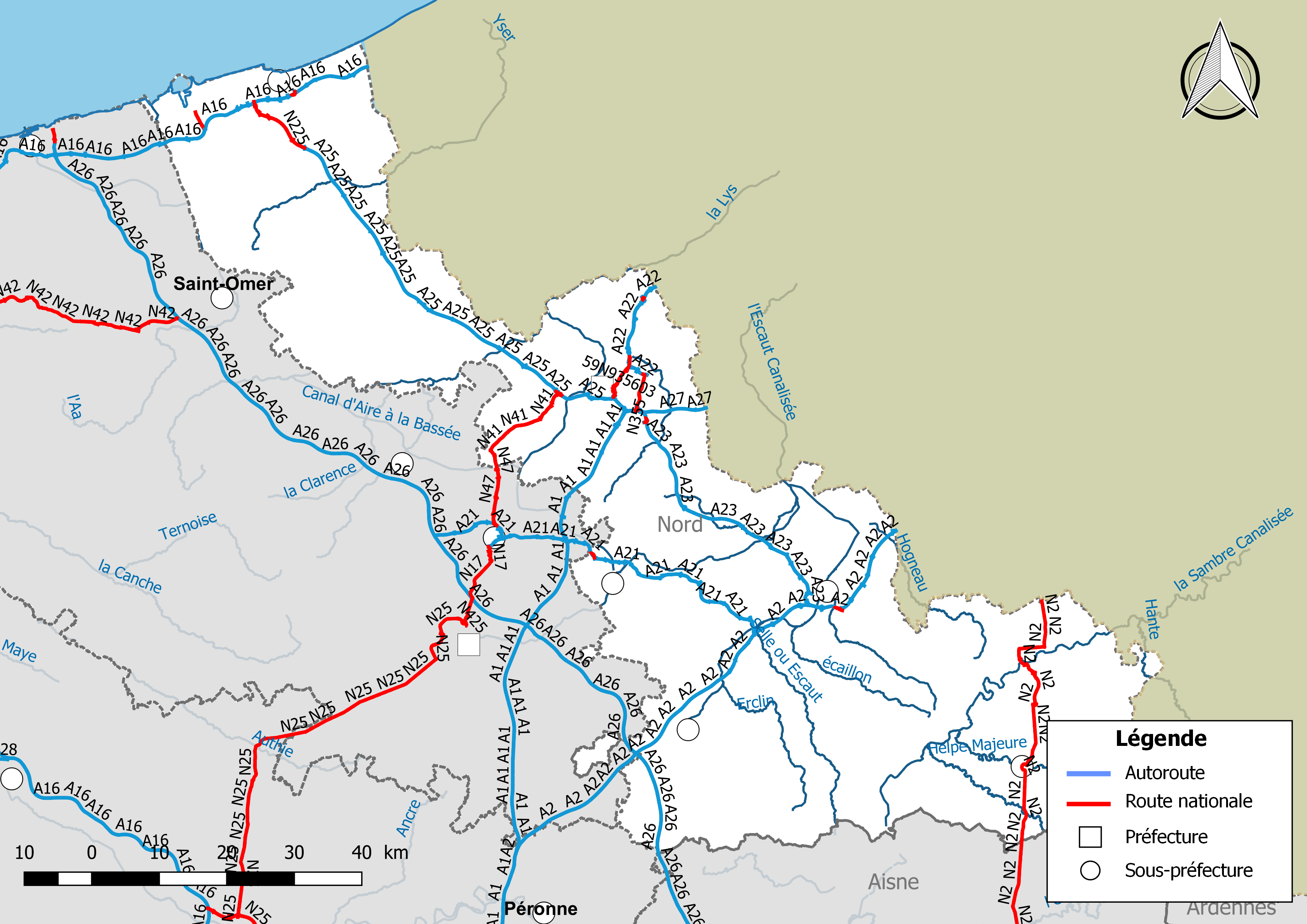 Carte du réseau routier national, constitué des autoroutes et des routes nationales, dans le département du Nord (France). Situation au 1er janvier 2019.